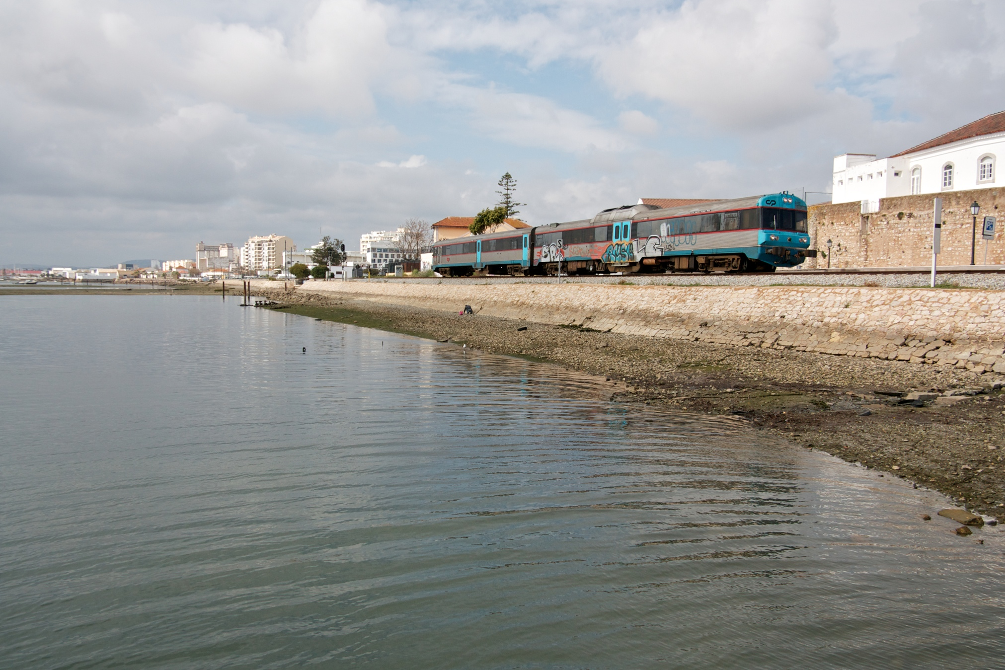 Tipo: Comboio Regional 5719 [Faro - Vila Real de Santo António] Local: Faro [Linha do Algarve , PK 340] Data e hora: 31 de Março de 2012 [16h26] Material: Automotora 0455 [Unidade Dupla Diesel]